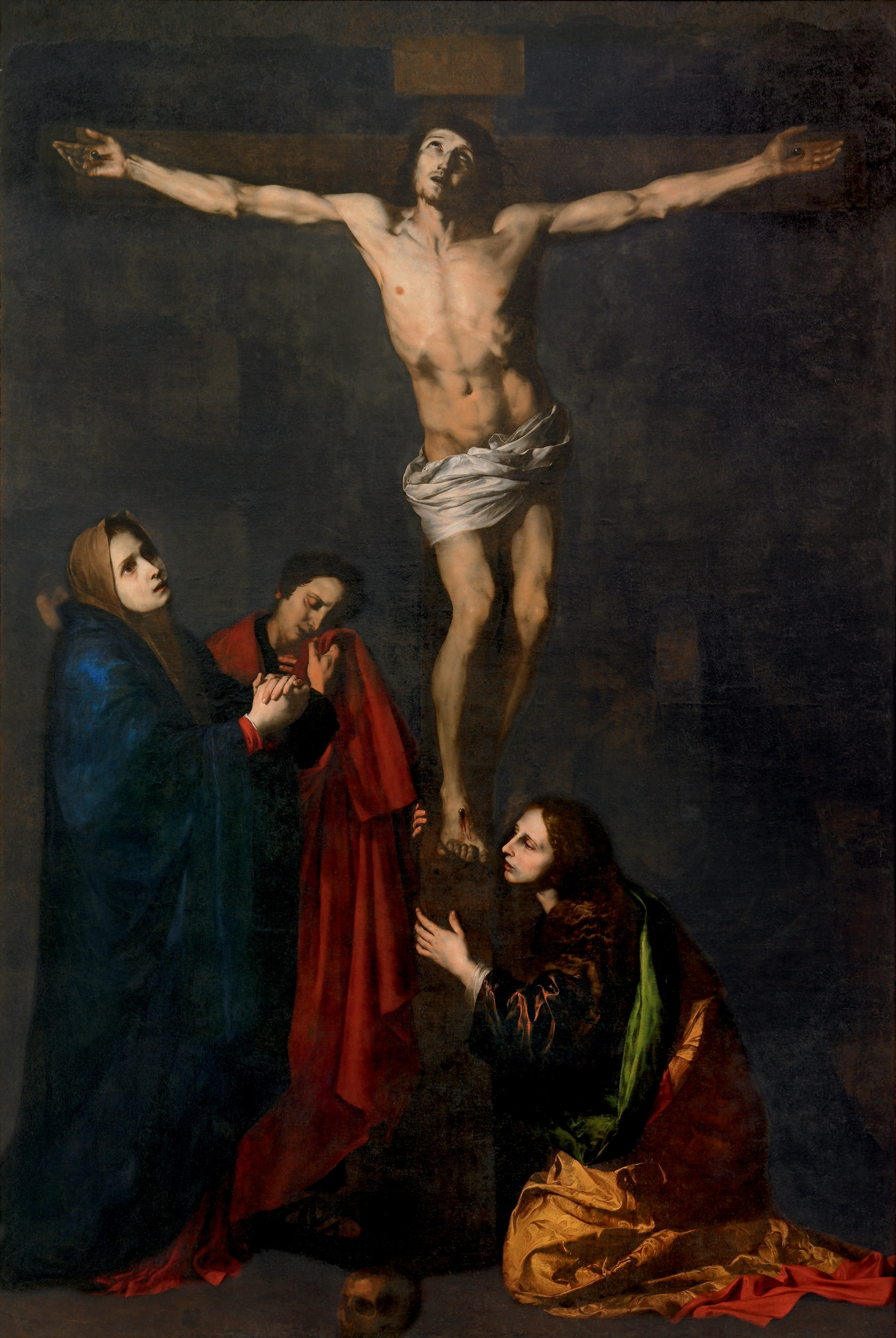 La obra muestra a Jesucristo crucificado junto a su madre, la Virgen María, y las santas mujeres.